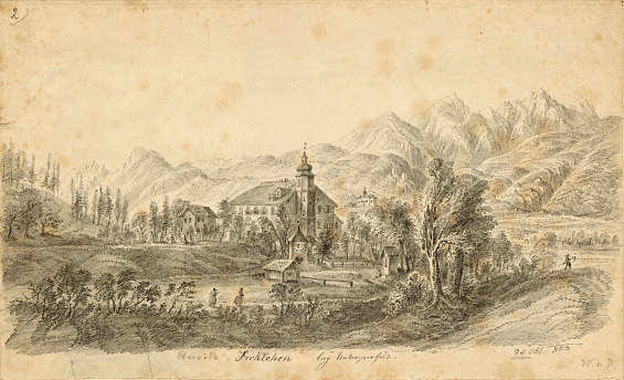 Ansicht des Tiroler Ansitzes Ferklehen